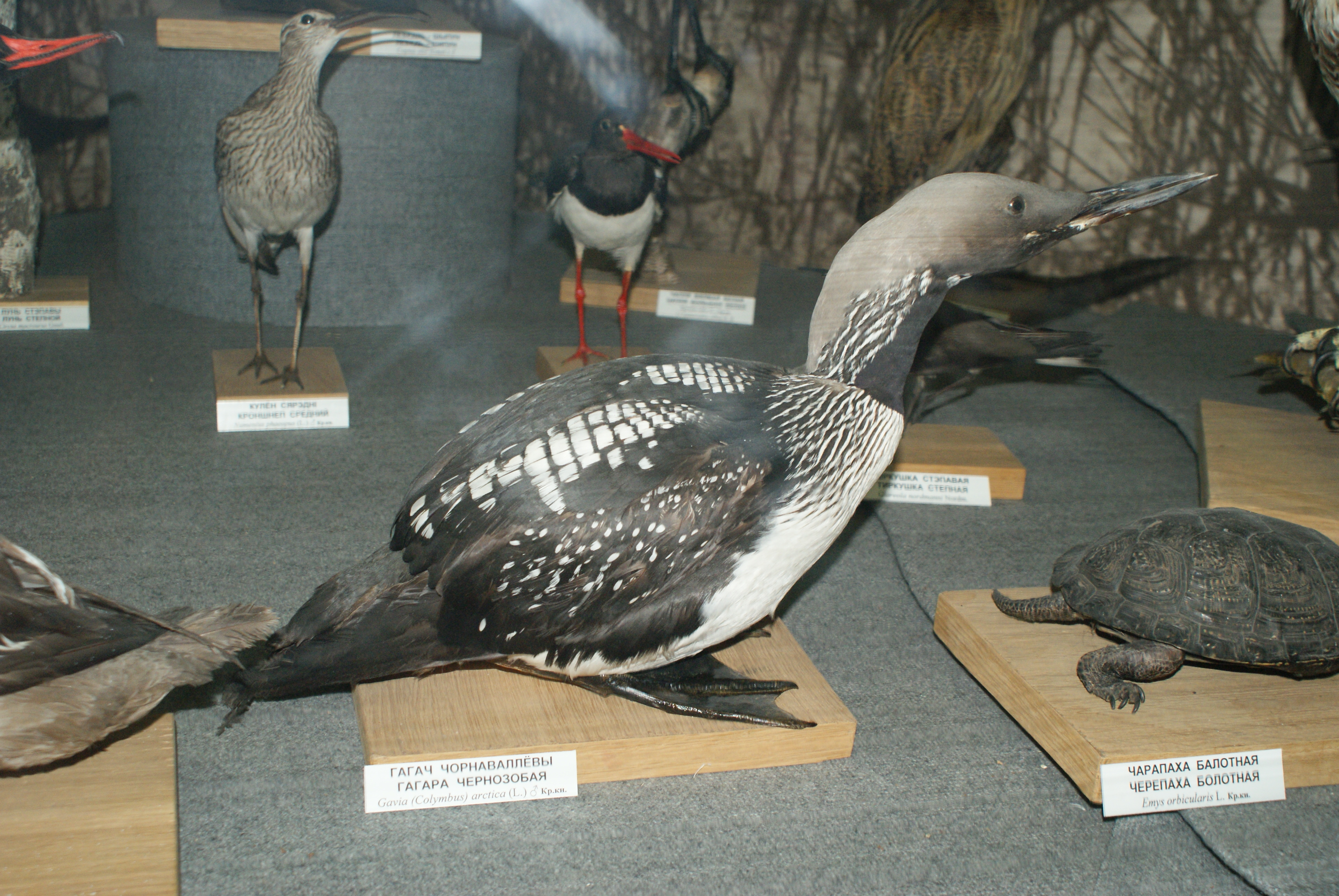 Музей прыроды і экалогіі Рэспублікі Беларусь